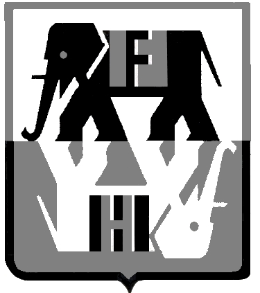 Andere Namensträger des Namens Helfferich verwendeten für ihr Familienwappen einen Elefanten, Urheber des Logos unbekannt, Firma 1968 aus dem Handelsregister gelöscht.